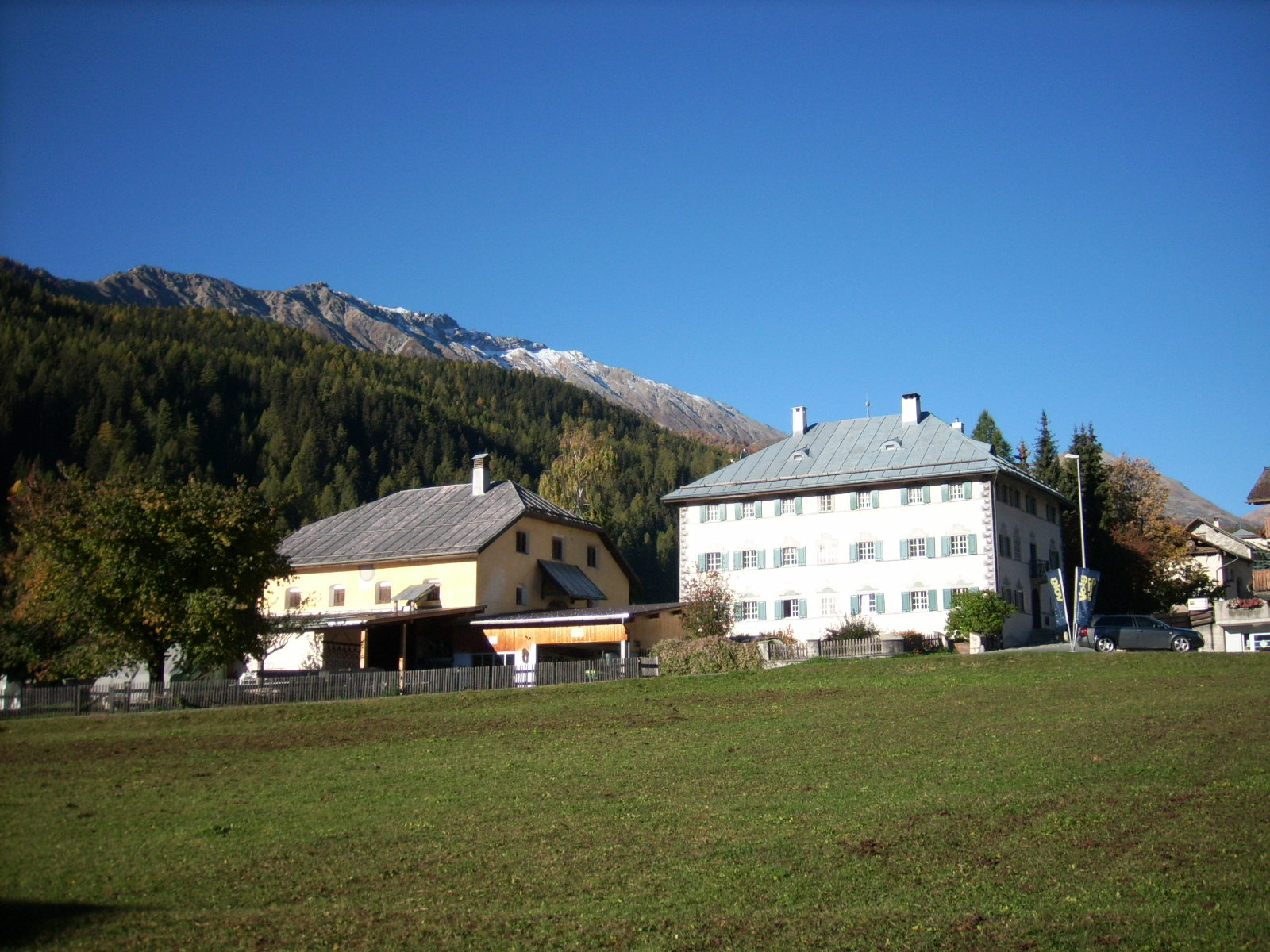 House in Valchava, Switzerland